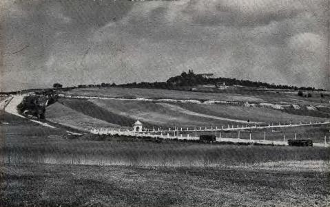 Der St. Annaberg in Oberschlesien